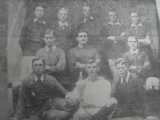 Oldenzaal foto 1915